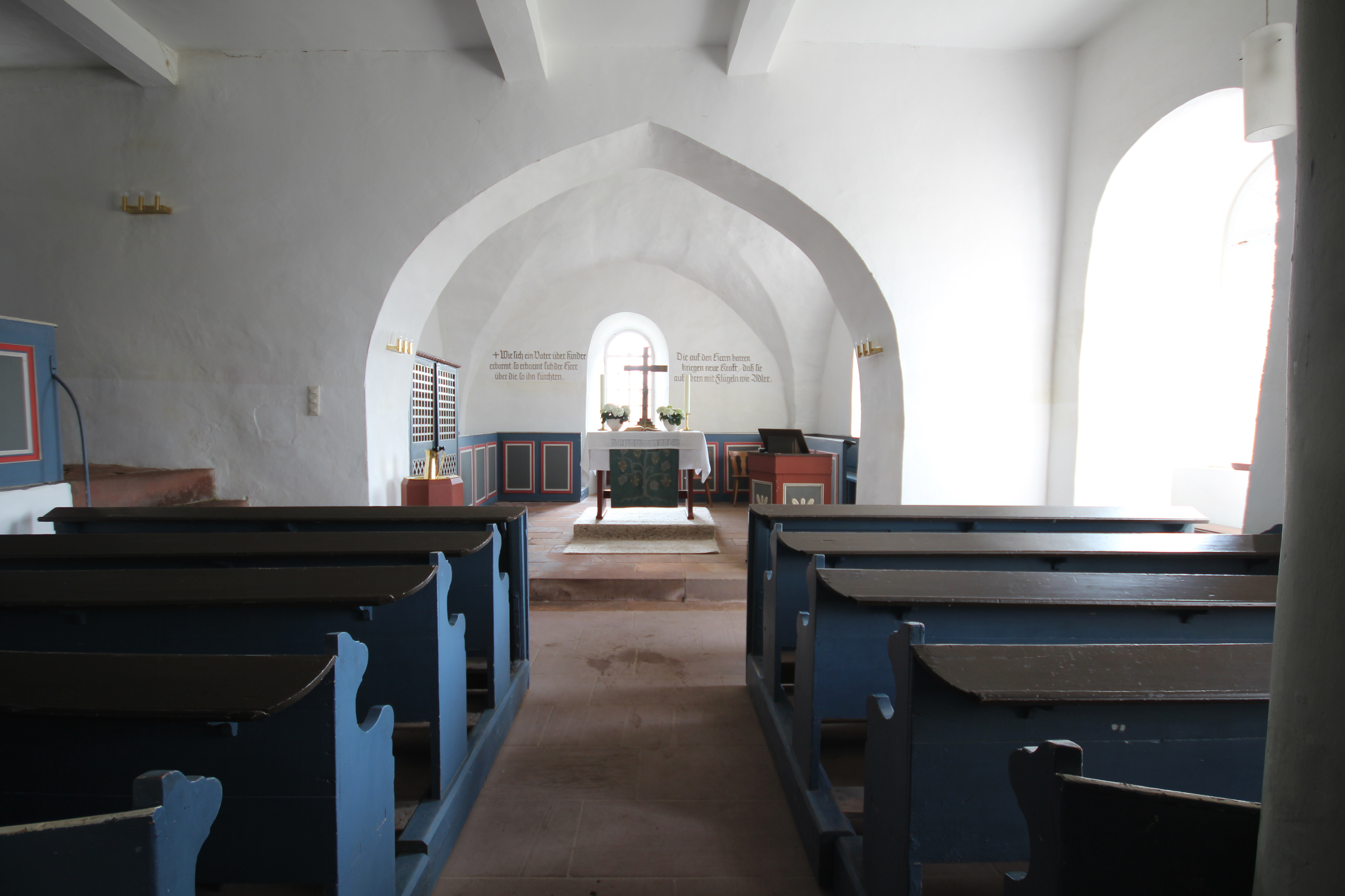 Blick vom Eingang zum Chorraum der Burgkapelle Nordeck